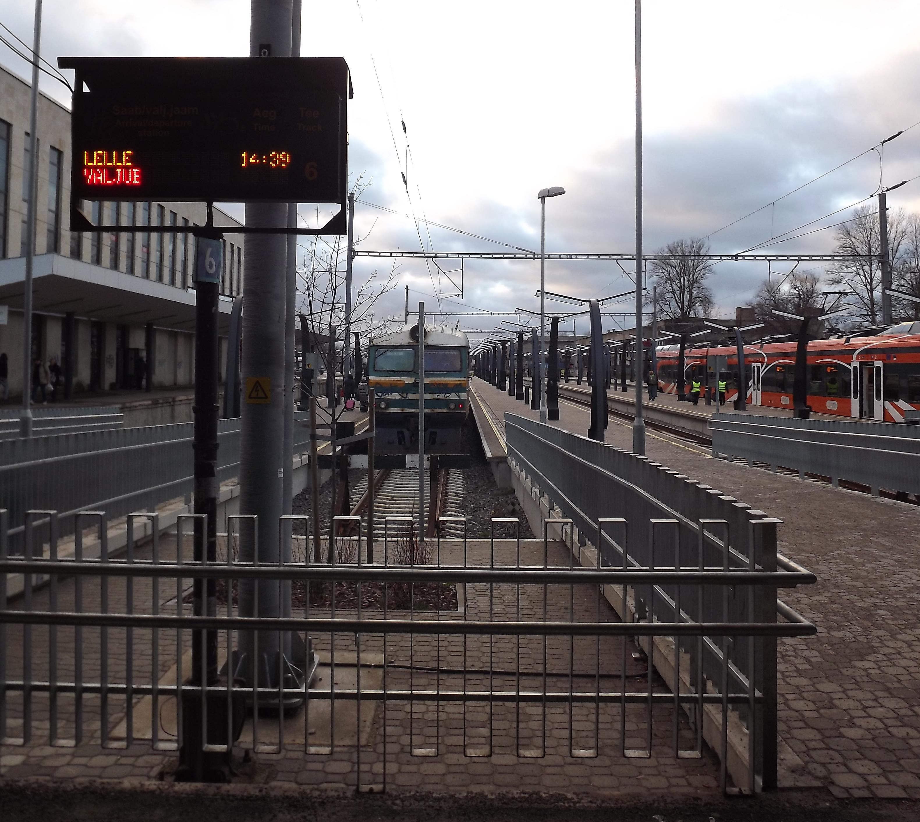 Lelle rong Balti Jaamas.